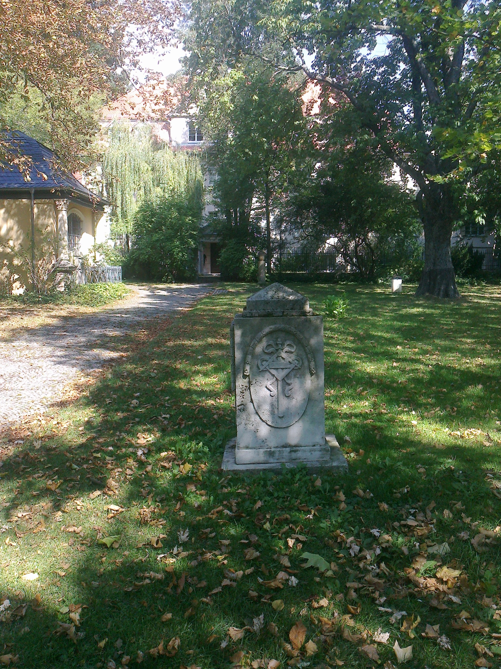 Gedenkstein auf Johann Martin Mieding mit Berufsinsignien